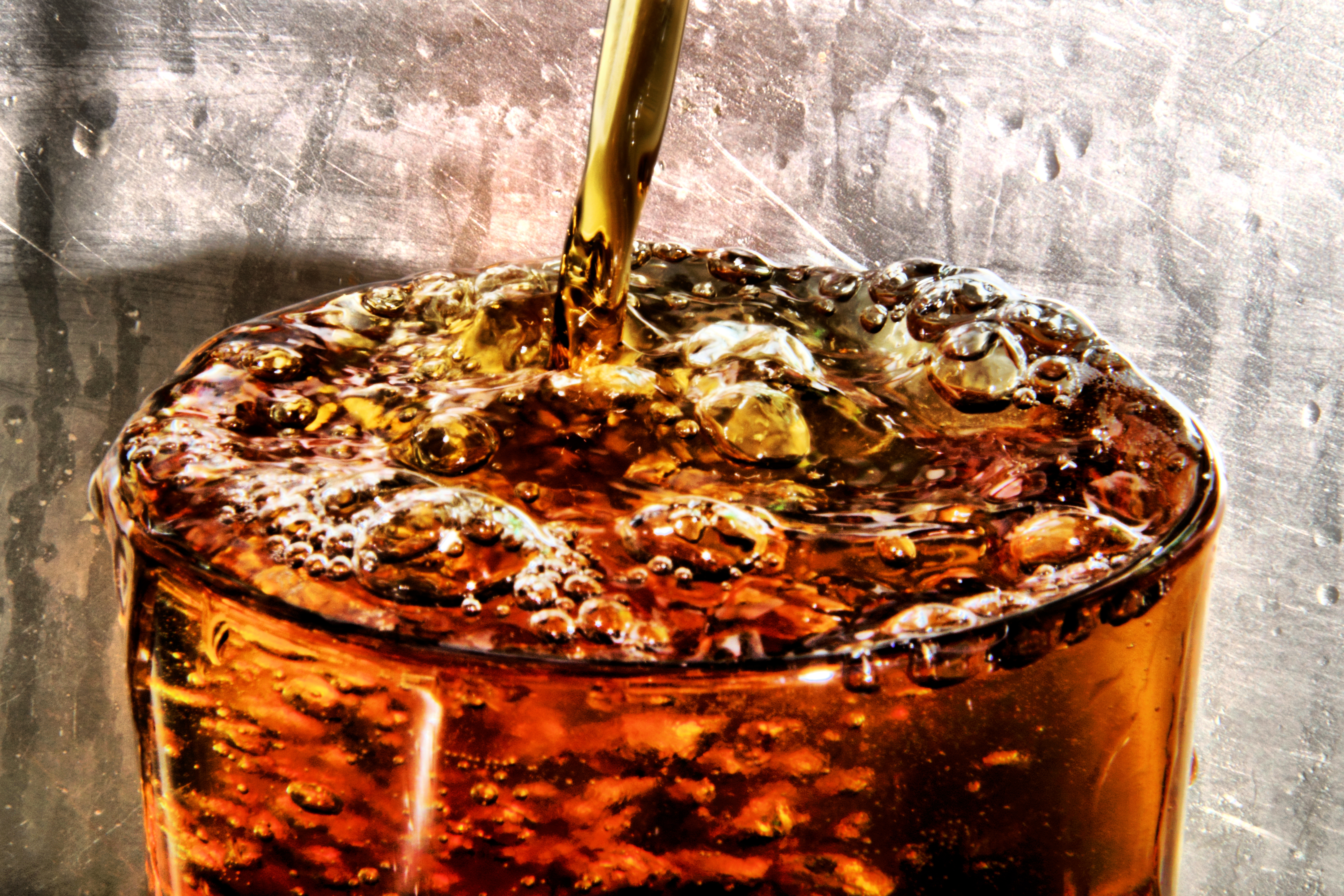 Coca-Cola glasses